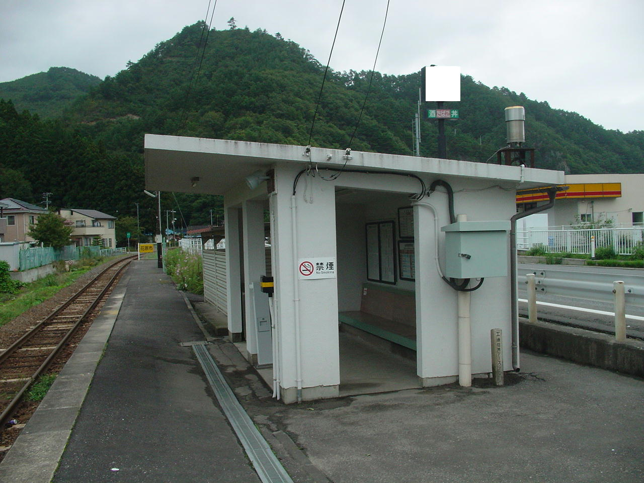 （花原市駅）